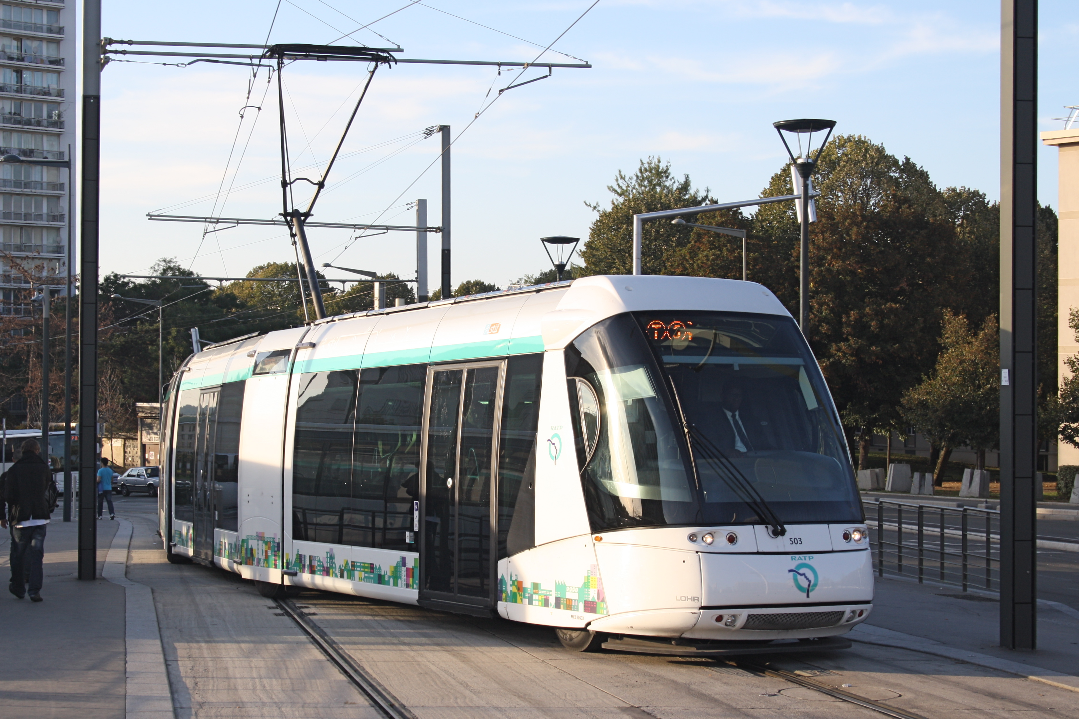 Translohr au terminus de Sarcelles